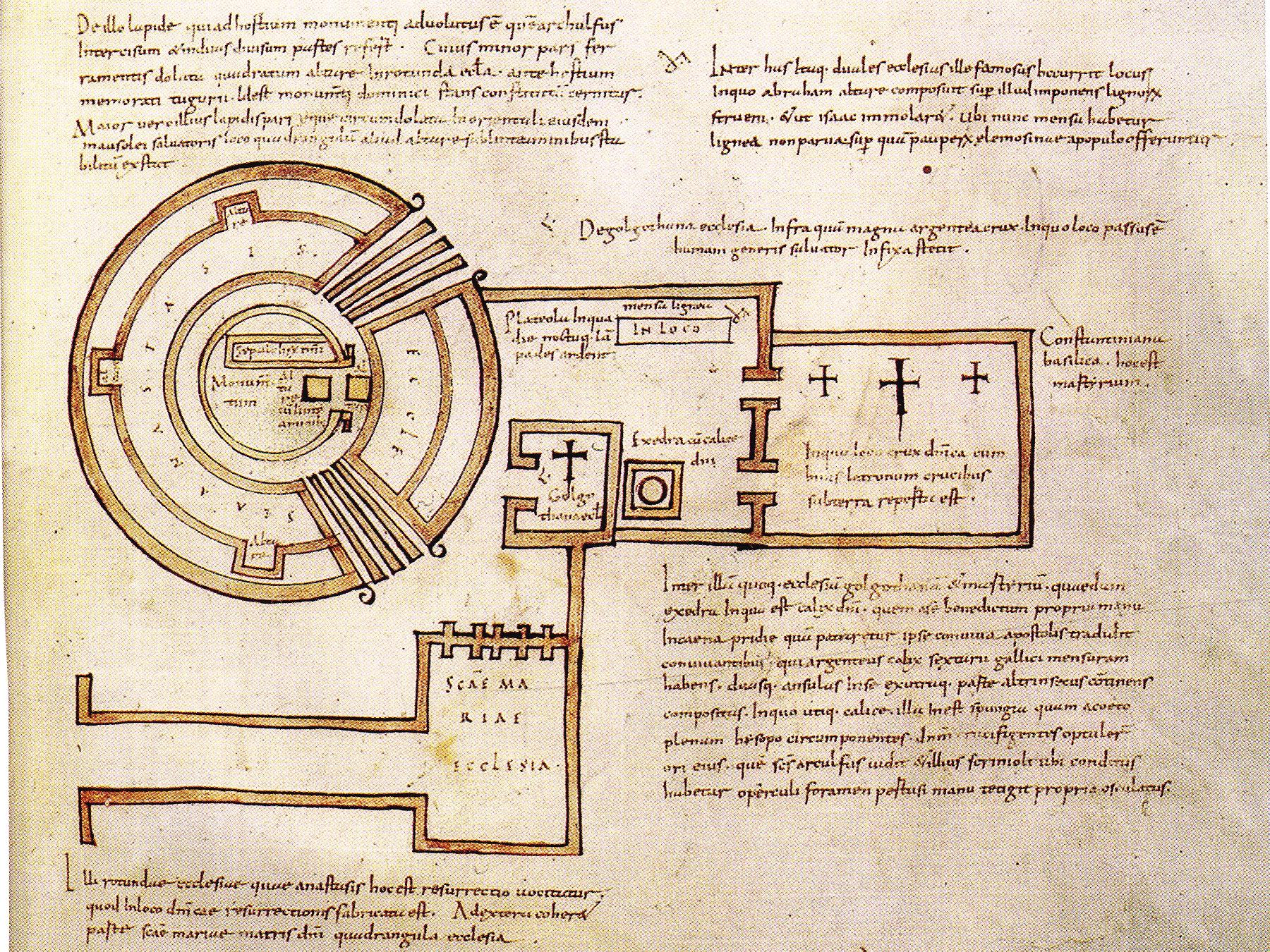 Le Saint-Sépulcre de Jérusalem au VIIè siècle d'après la description faite par Arculfe (le plus ancien plan d'architecture connu).